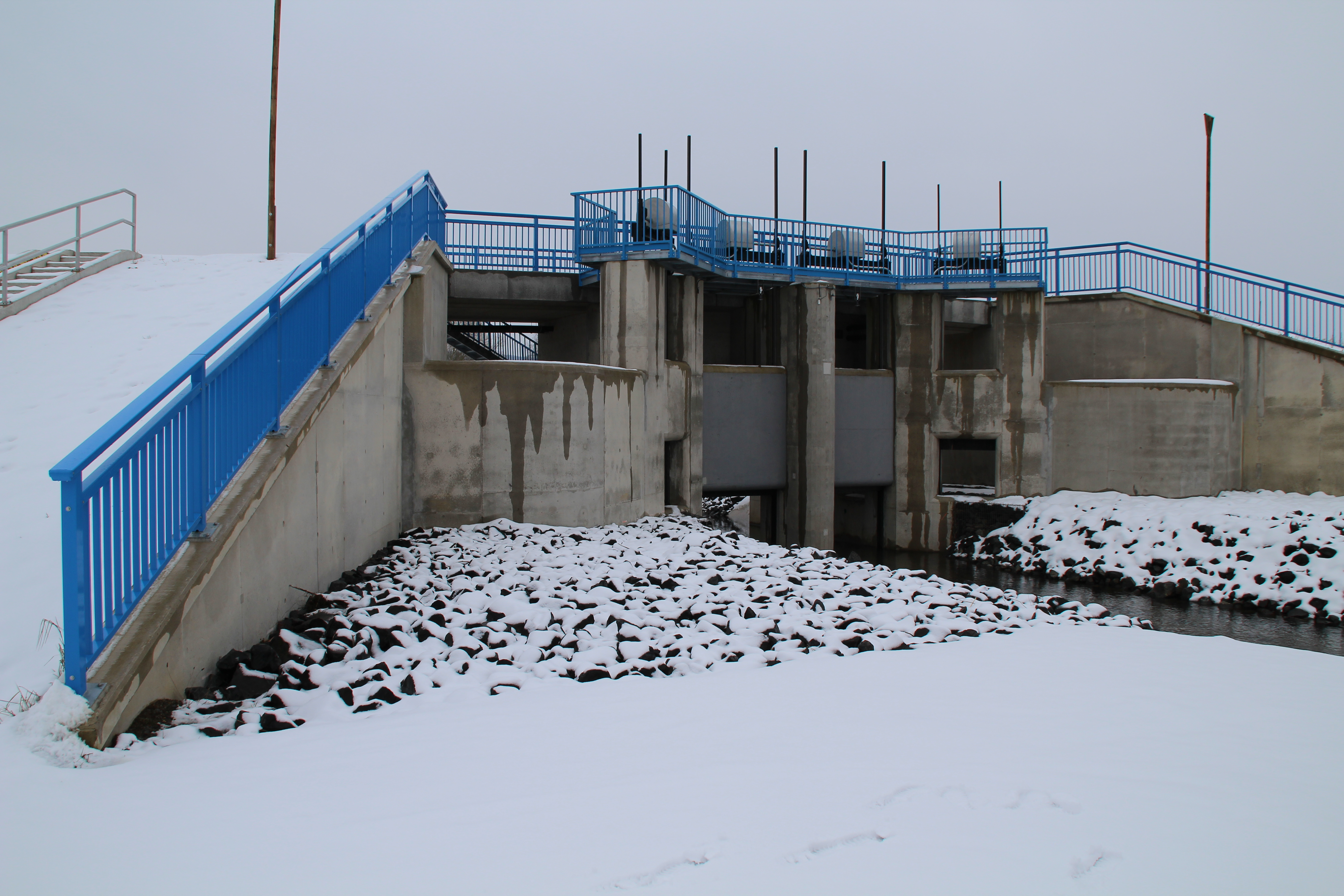 Lohra Otsteil Damm. Sperreinrichtung am Rückhaltebecken der Salzböde